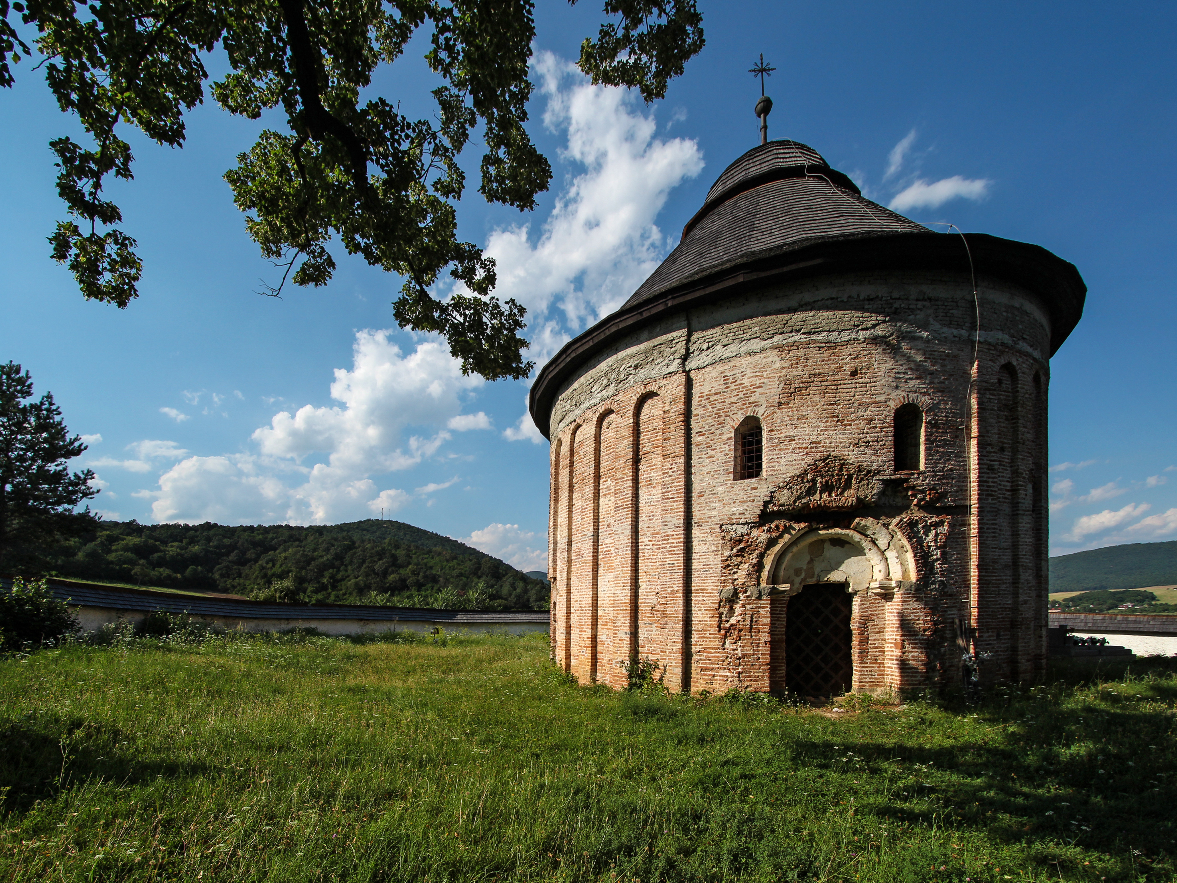 Šivetice, rotunda sv. Margity Antiochijskej